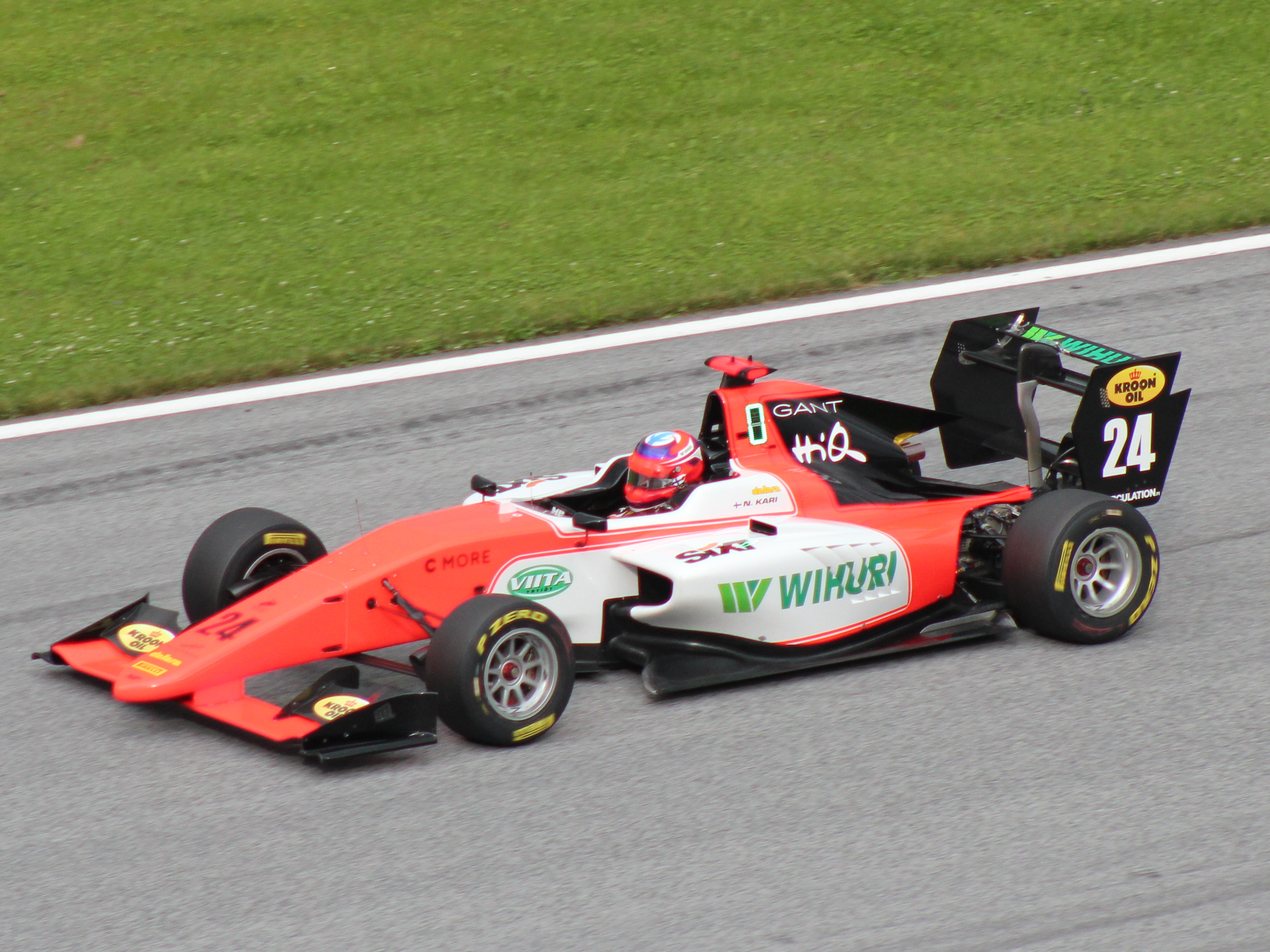 24 Niko Kari beim Rennwochenende in Österreich 2018